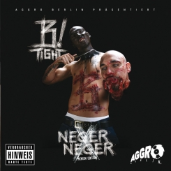 Cover des Albums „Neger Neger“ (X-Edition)